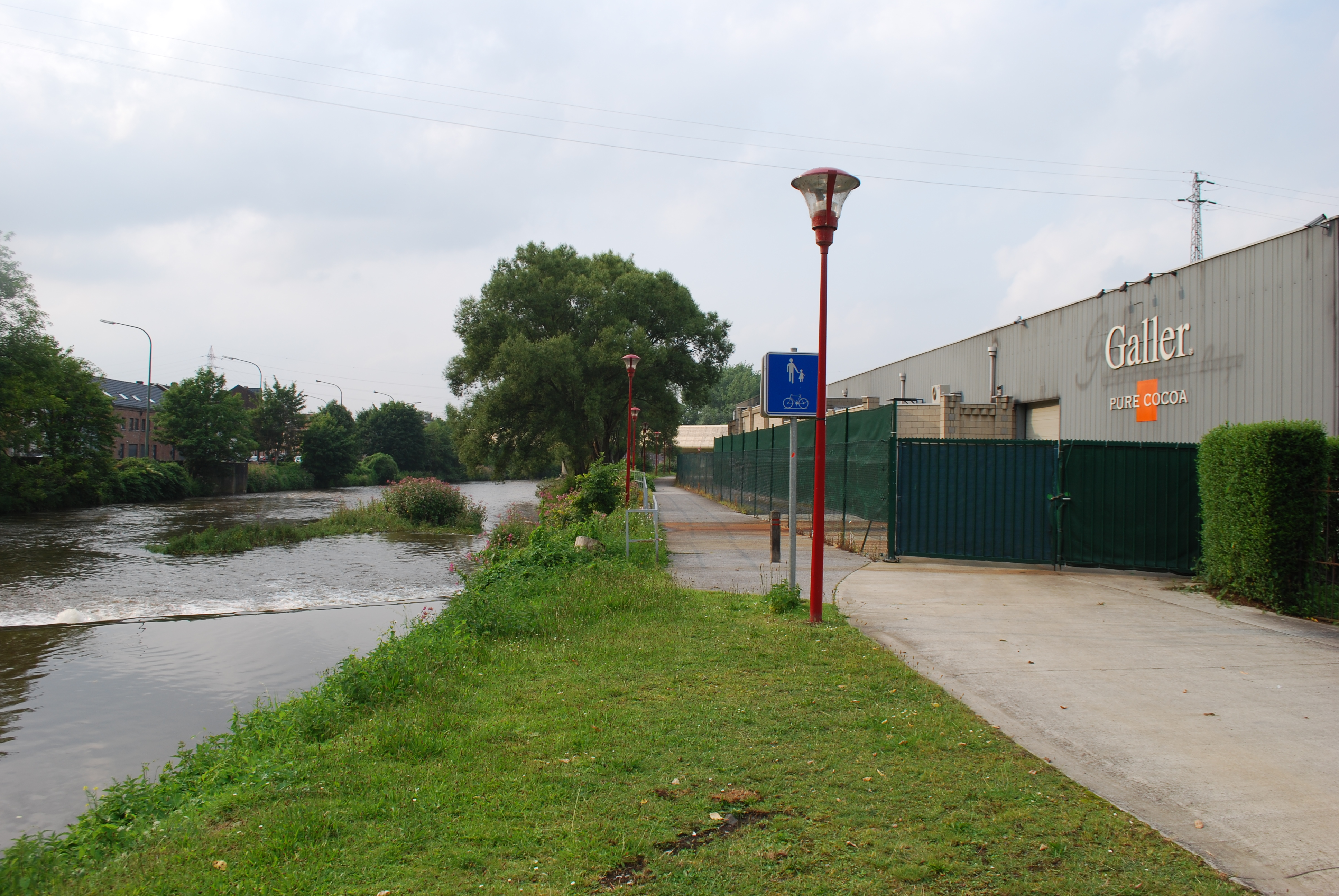 Vue de la rive droite de la Vesdre à Vaux-sous-Chèvremont.